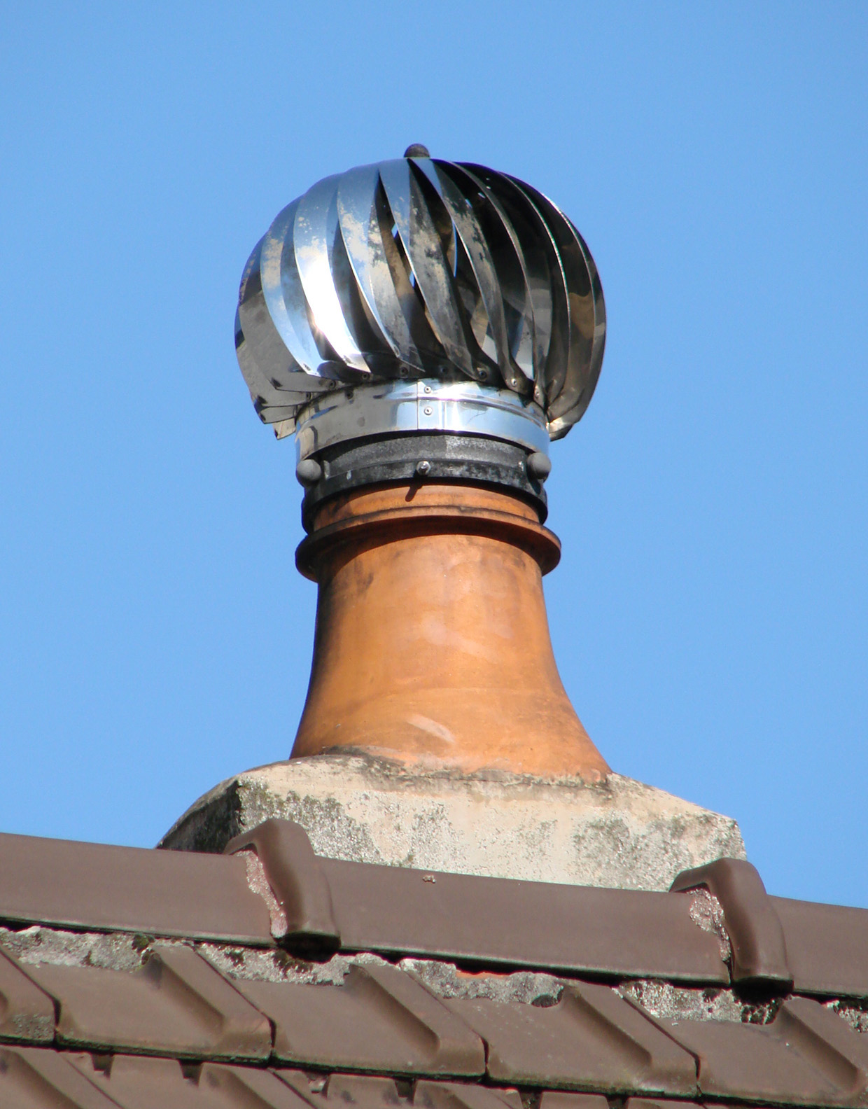 Cheminée surmontée d'un moulin.